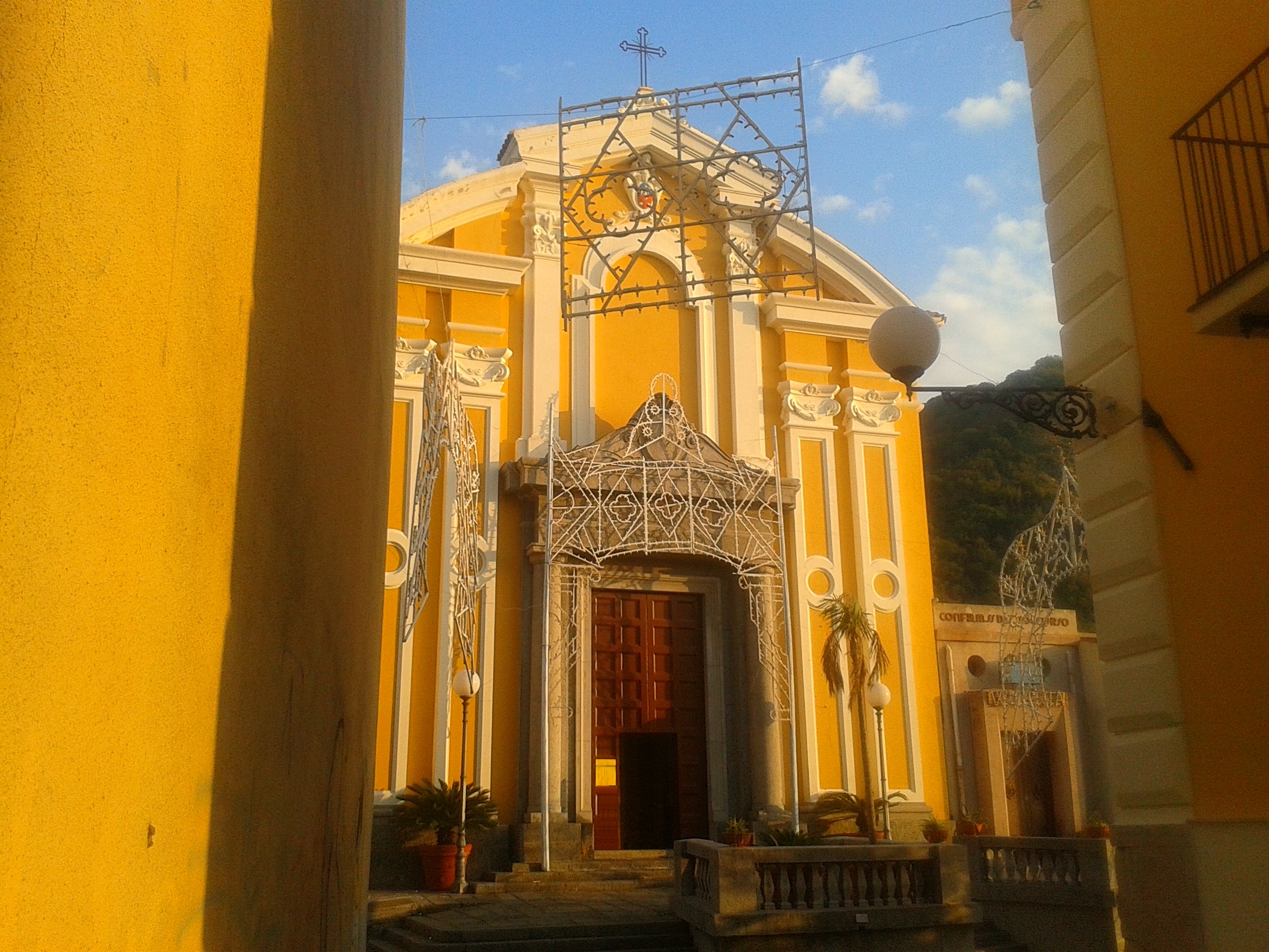 Palmi (RC). Chiesa del Soccorso, con luminarie, ripresa dal corso Garibaldi